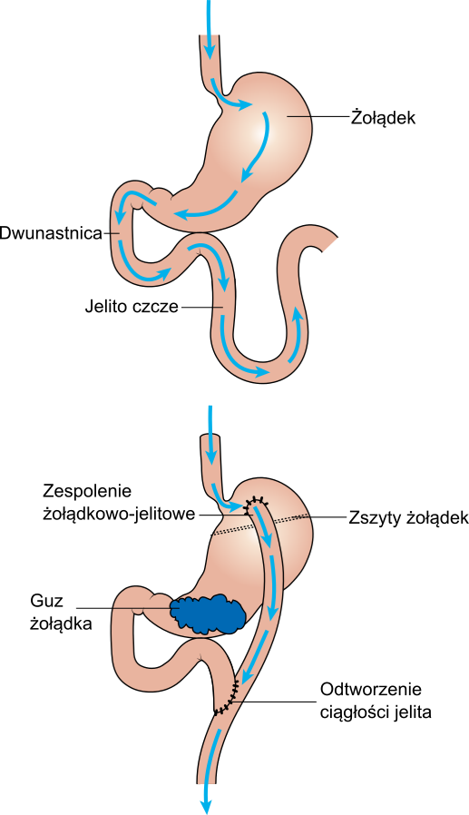 Paliatywne zespolenie omijające raka żołądka (by-pass żołądka)